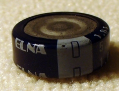 Doppelschichtkondensator